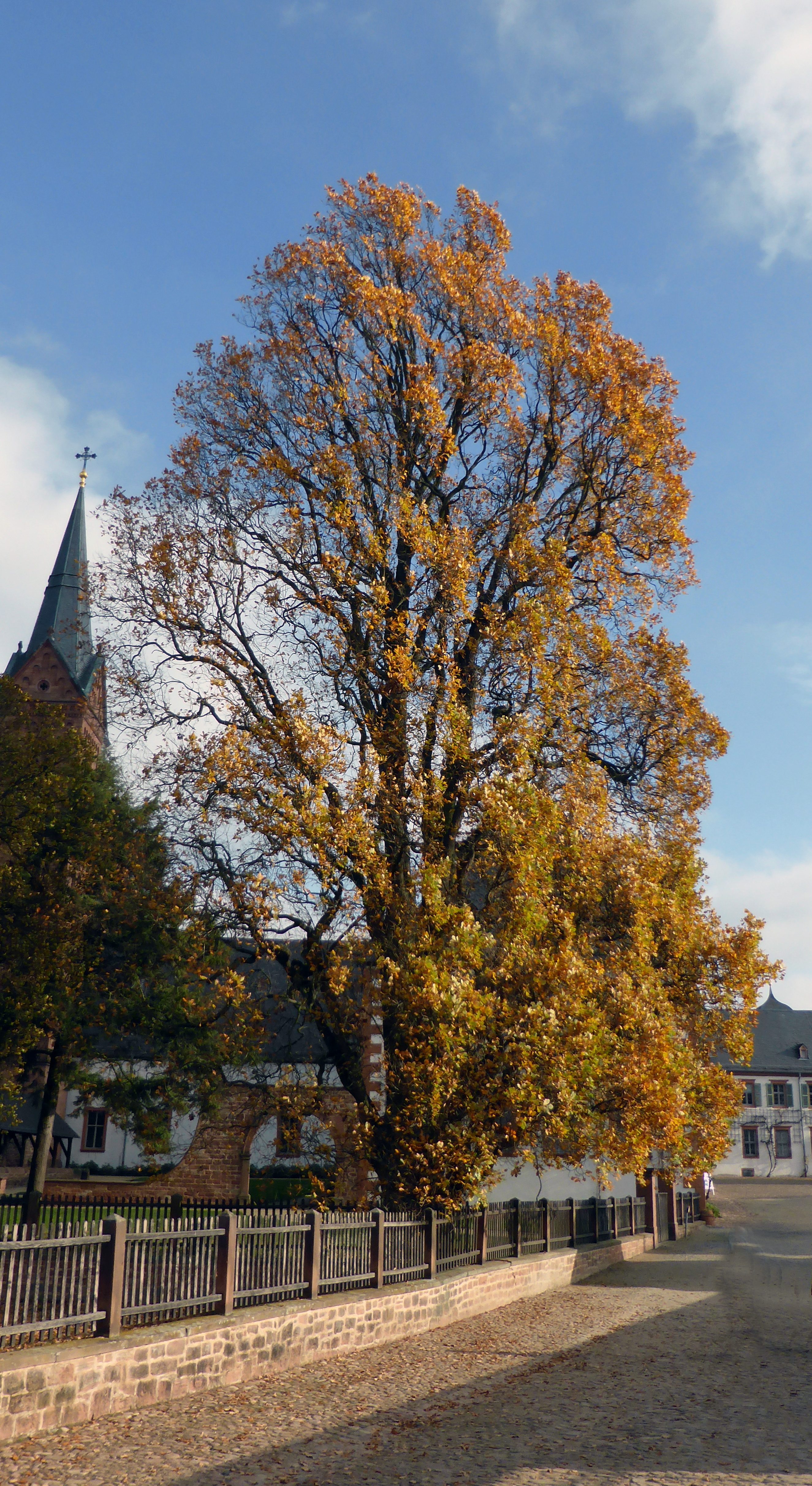 Säuleneiche (Quercus robur "Fastigiata") im Klostergarten in Seligenstadt.